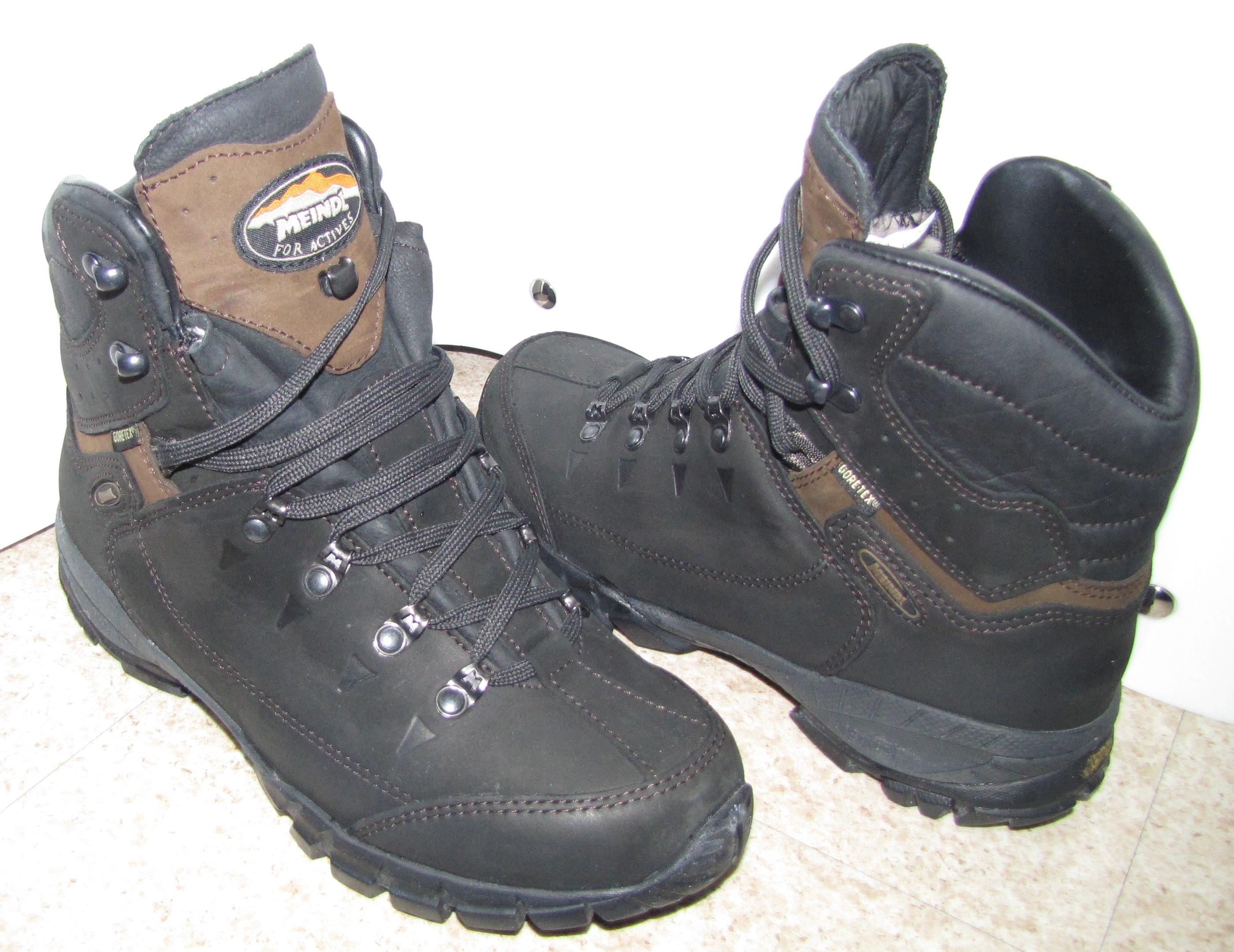 Meindl Gastein Chaussures chaudes pour femmes de pointure 40. Tige: cuir nubuck ciré imperméable. Doublure: 100% laine de mouton, membrane Gore-Tex. Semelle : Vibram Ice Trek, crantée et adaptée à la marche sur neige. Poids 1300grammes. Cloris : Marron foncé. 215€ Au Vieux Campeur.